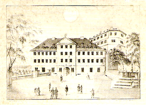 Das Evangelisch-Theologische Seminar in Tübingen (Lithographie 22,2 × 29,0 cm); Schefold 9510A